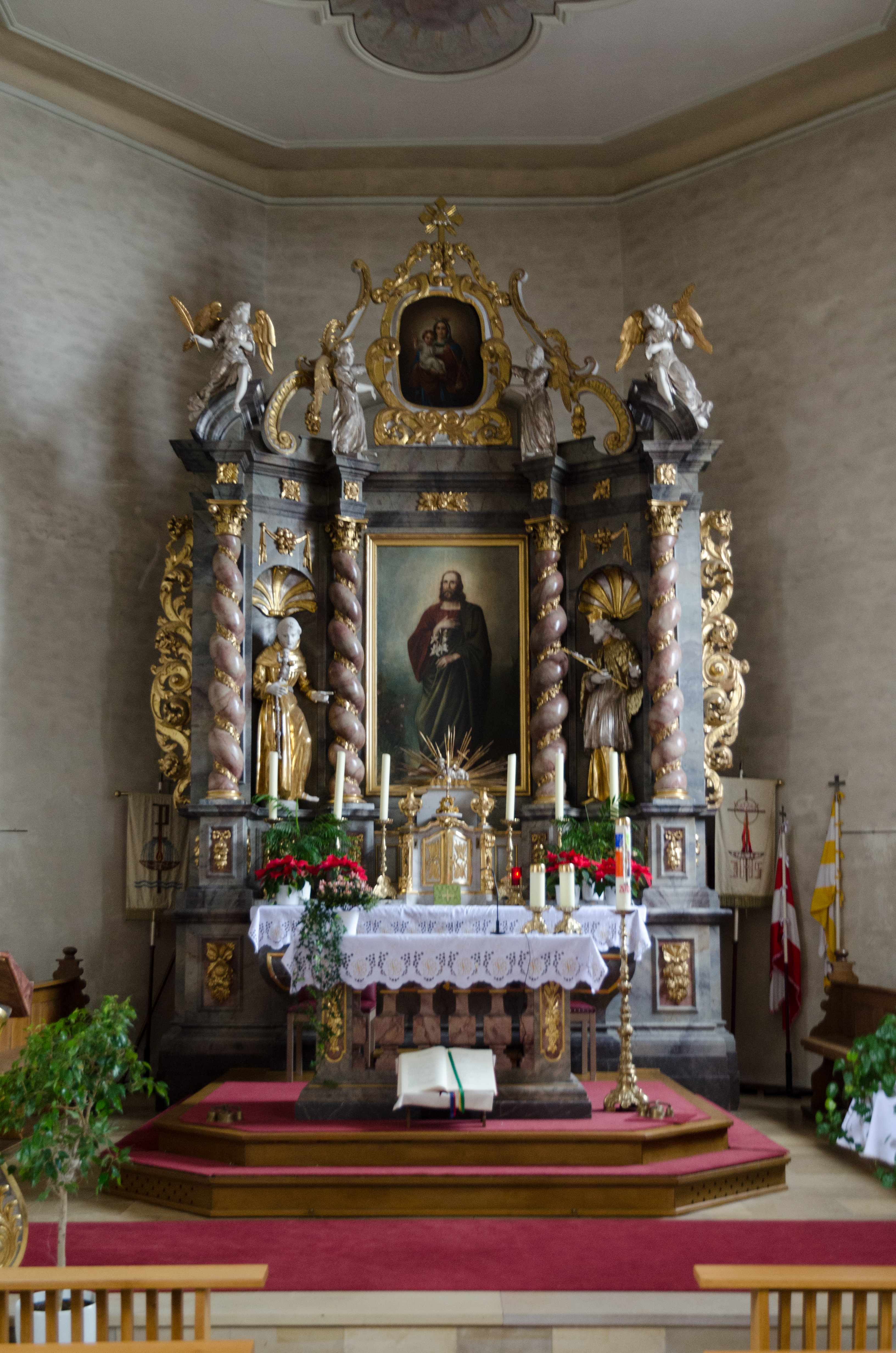 Sandberg, Waldberg, Katholische Kuratiekirche St. Josef